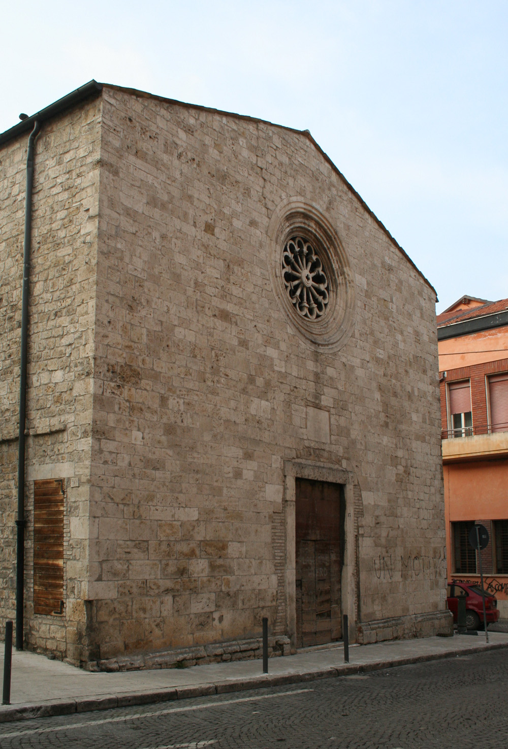 Chiesa di San Giuliano di Ascoli Piceno, facciata, esterno giorno.